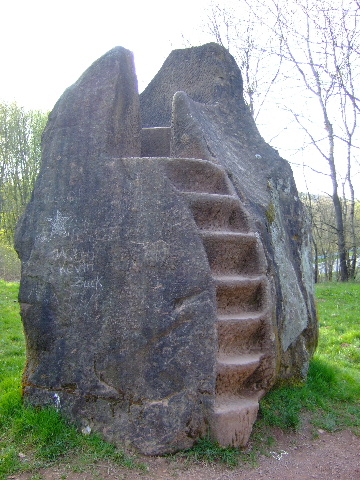 Leo Kornbrust: Liebesthron (1979/am Bostalsee - gelber Sandstein)